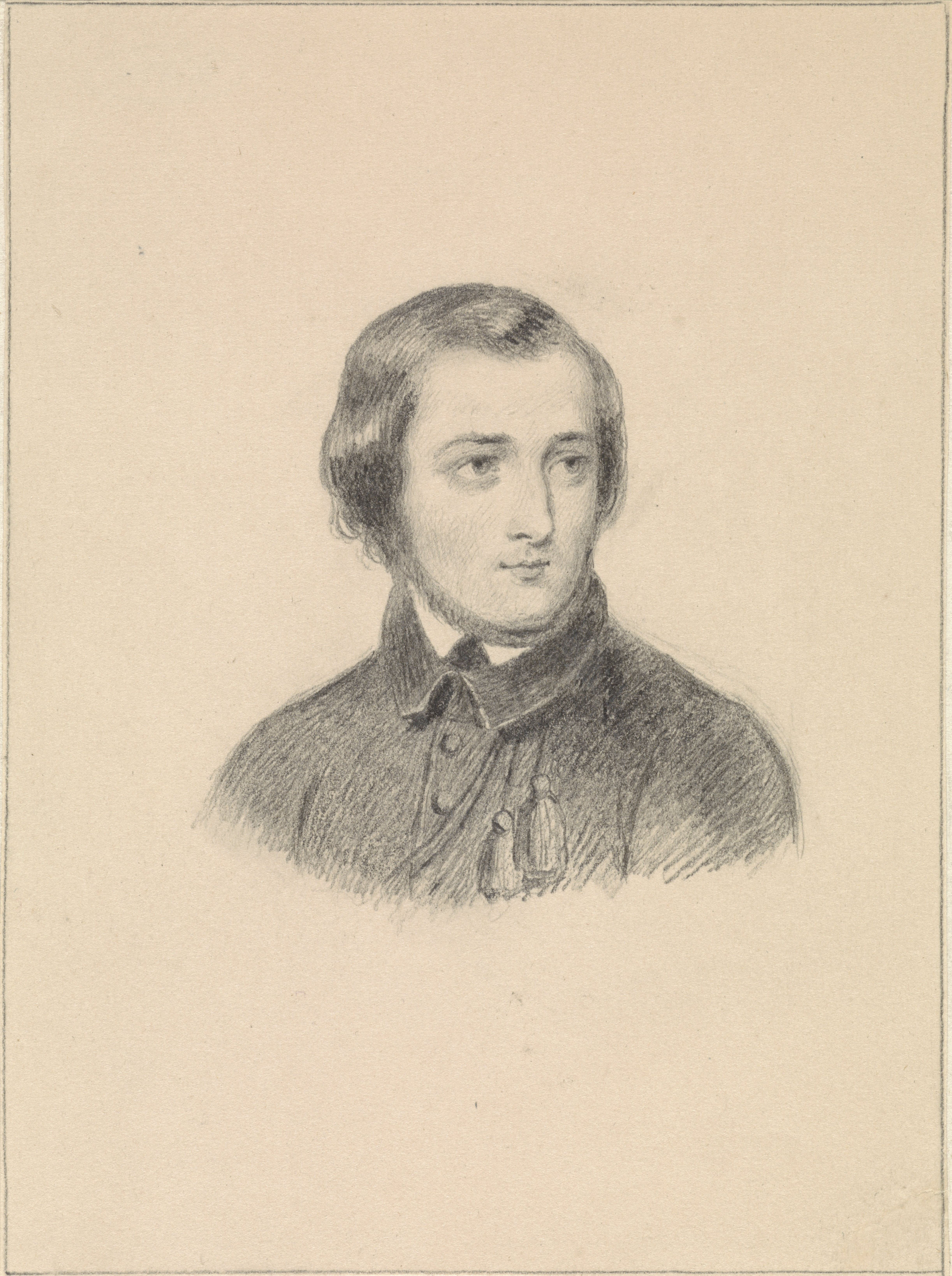 Portret van Willem Geefs, door Fanny Geefs-Corr (1840-1842)